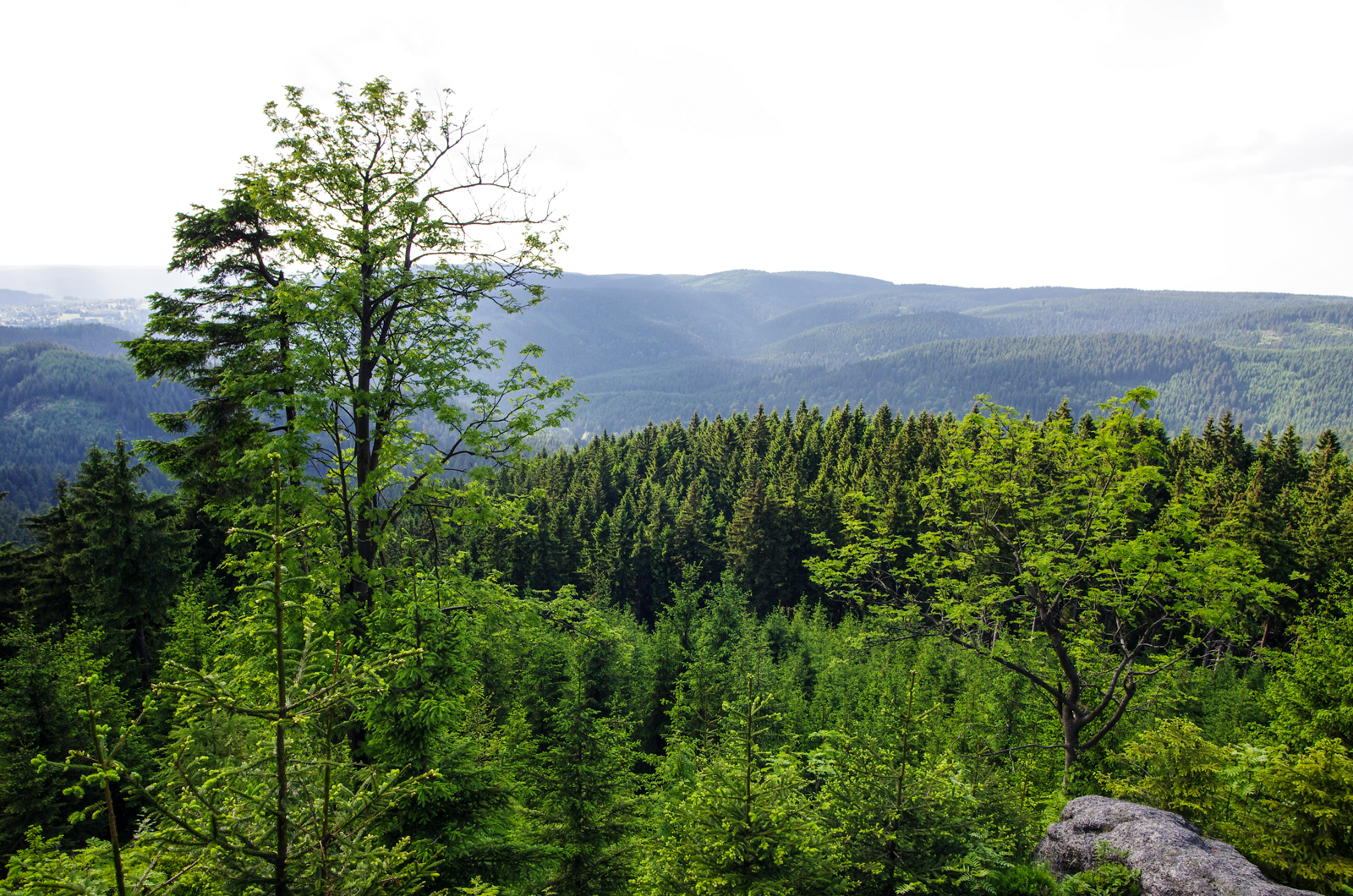 vrchol hory Špičák (990,8 m n.m.) u Přebuze - nejvyšší hory okresu Sokolov, pohled severním směrem přes Rájecké údolí ke státní hranici s Německem, Krušné hory